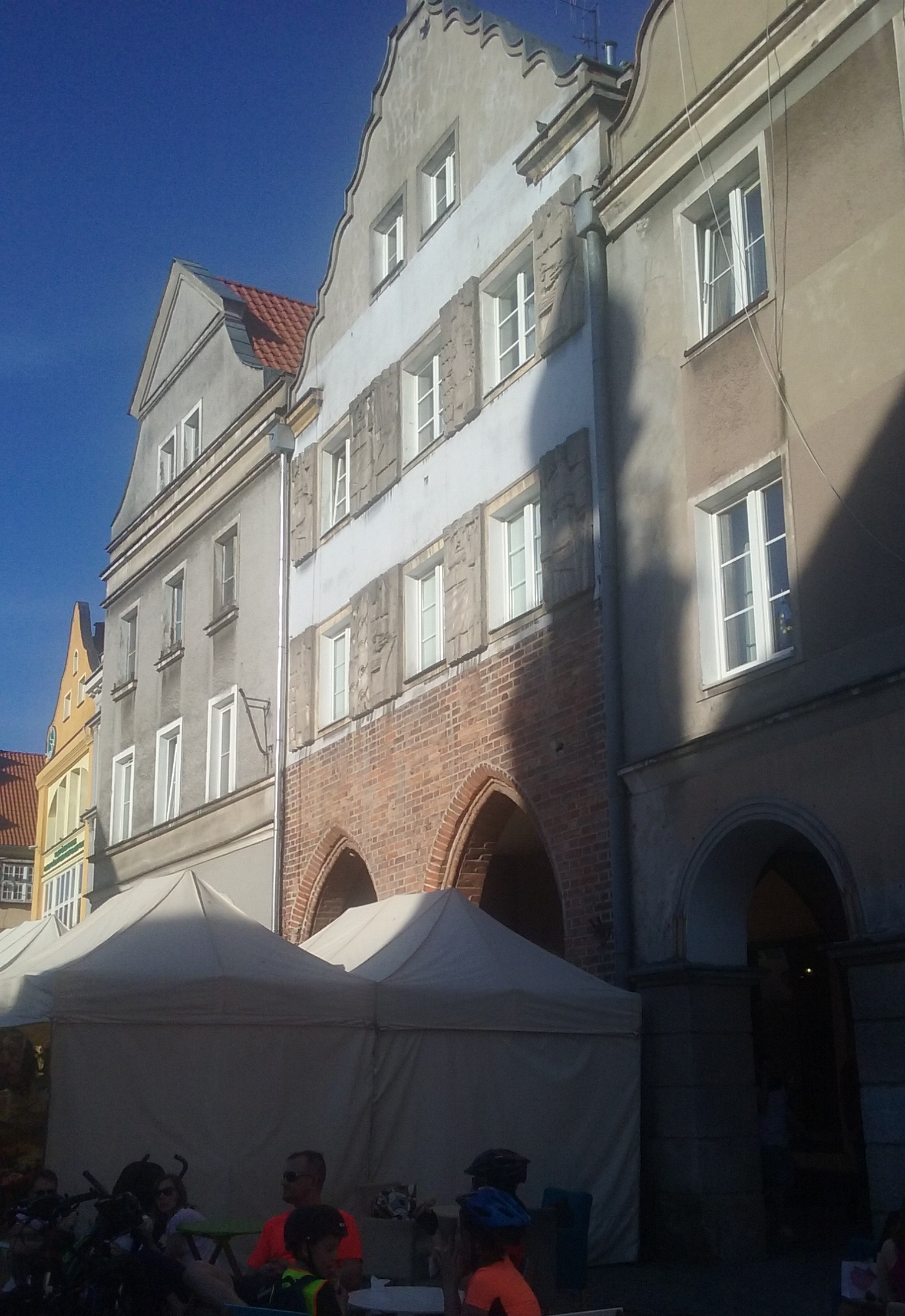 Dom Burmistrza w Olsztynie, Stare Miasto 11 - najstarszy murowany budynek mieszkalny w Olsztynie, z ok. 1500 roku. Na budynku cień wieży Starego Ratusza.